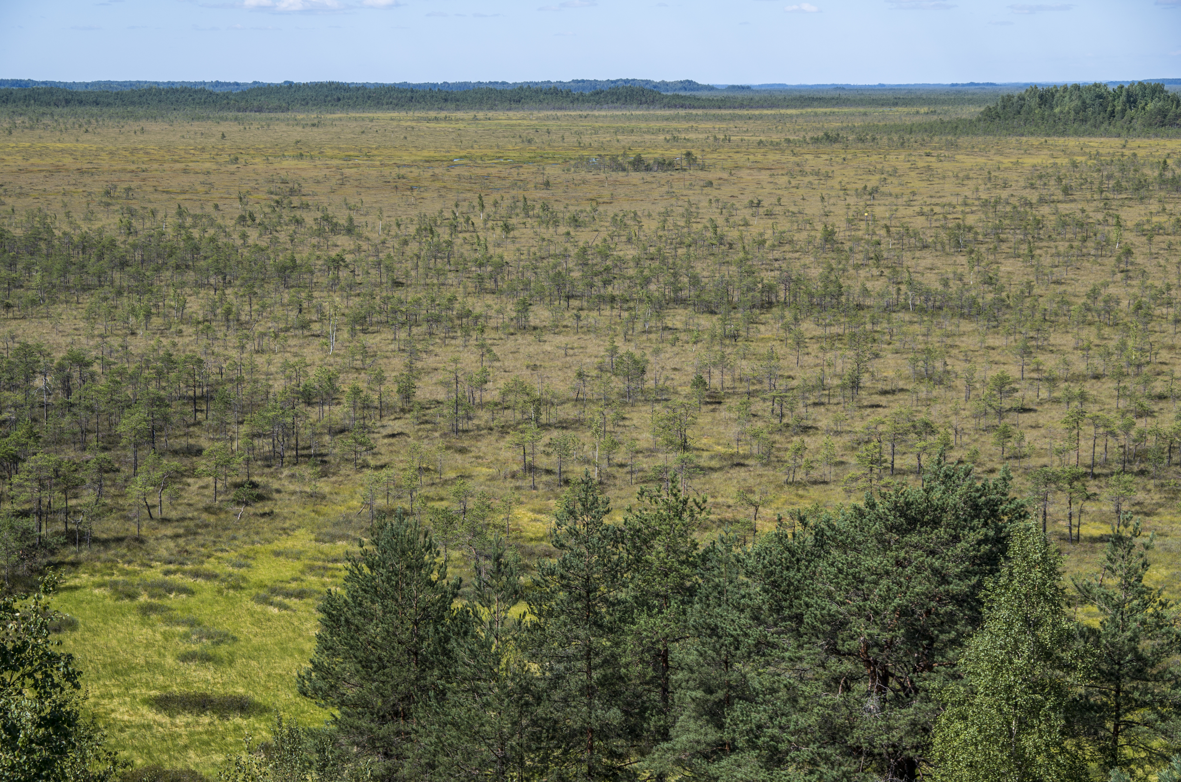 Teiču purvs no skatu torņa